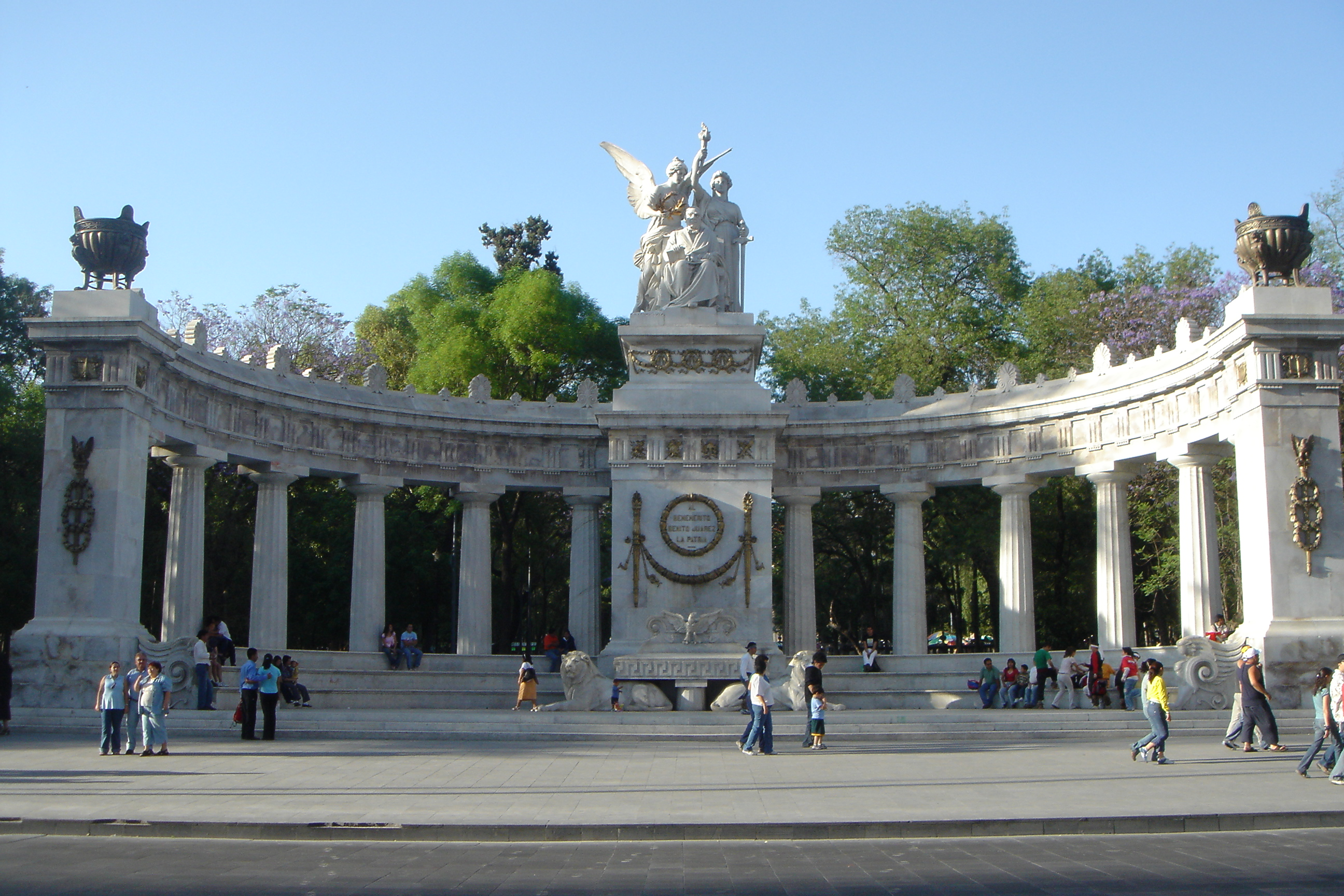 Hemiciclo a Benito Juárez